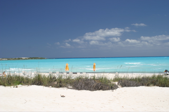 Playa en Emerald Bay, Great Exuma, Bahamas Object: Beach at Emerald Bay, Great Exuma, Bahamas Source: self Photographer: Nils Fretwurst Date: April 2004